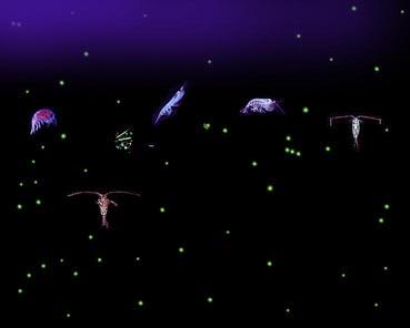 Originally from pt.wikipedia; description page is/was here. Fotomontagem com elementos do plâncton, ilustrando os três grupos: Fitoplâncton - formado principalmente por algas microscópicas; Bacterioplâncton - formado por bactérias; e Zooplâncton - formado por animais.